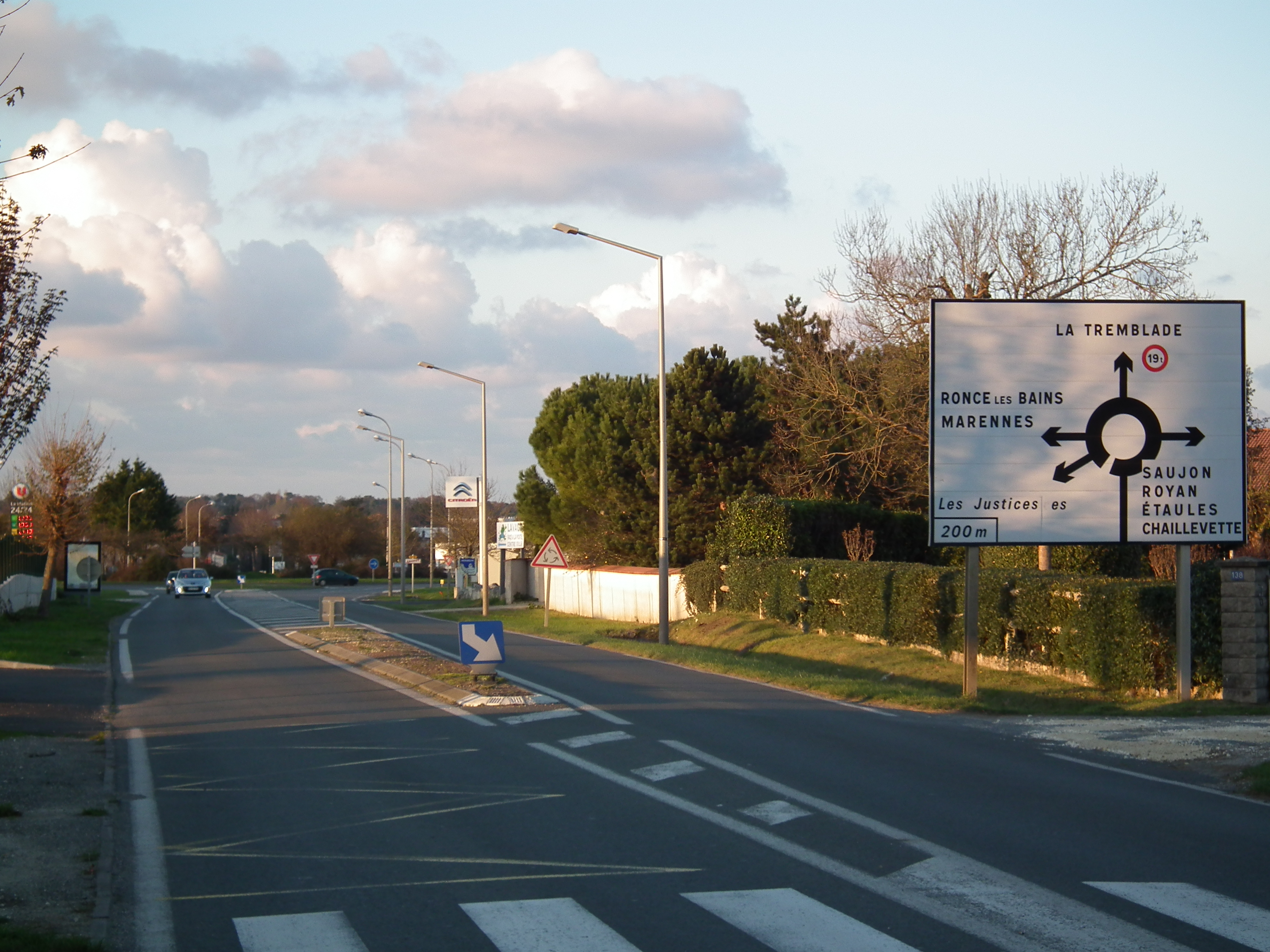 L'avenue de l'Etrade à Arvert, en direction de la rocade et de La Tremblade.